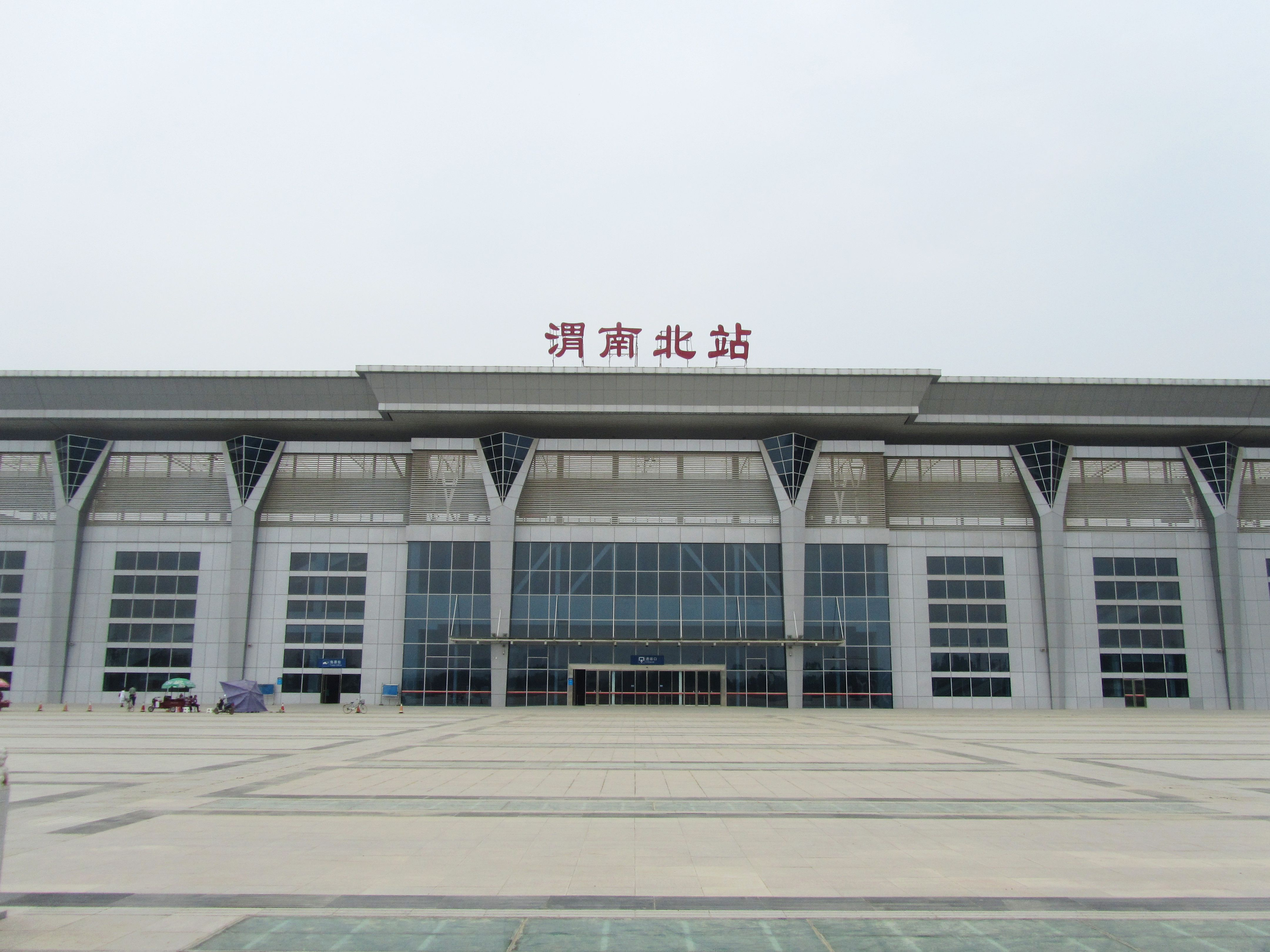 渭南北站正立面。